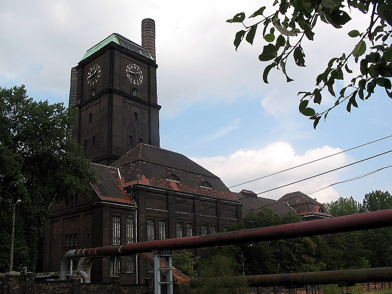 EC Szombierki dziś